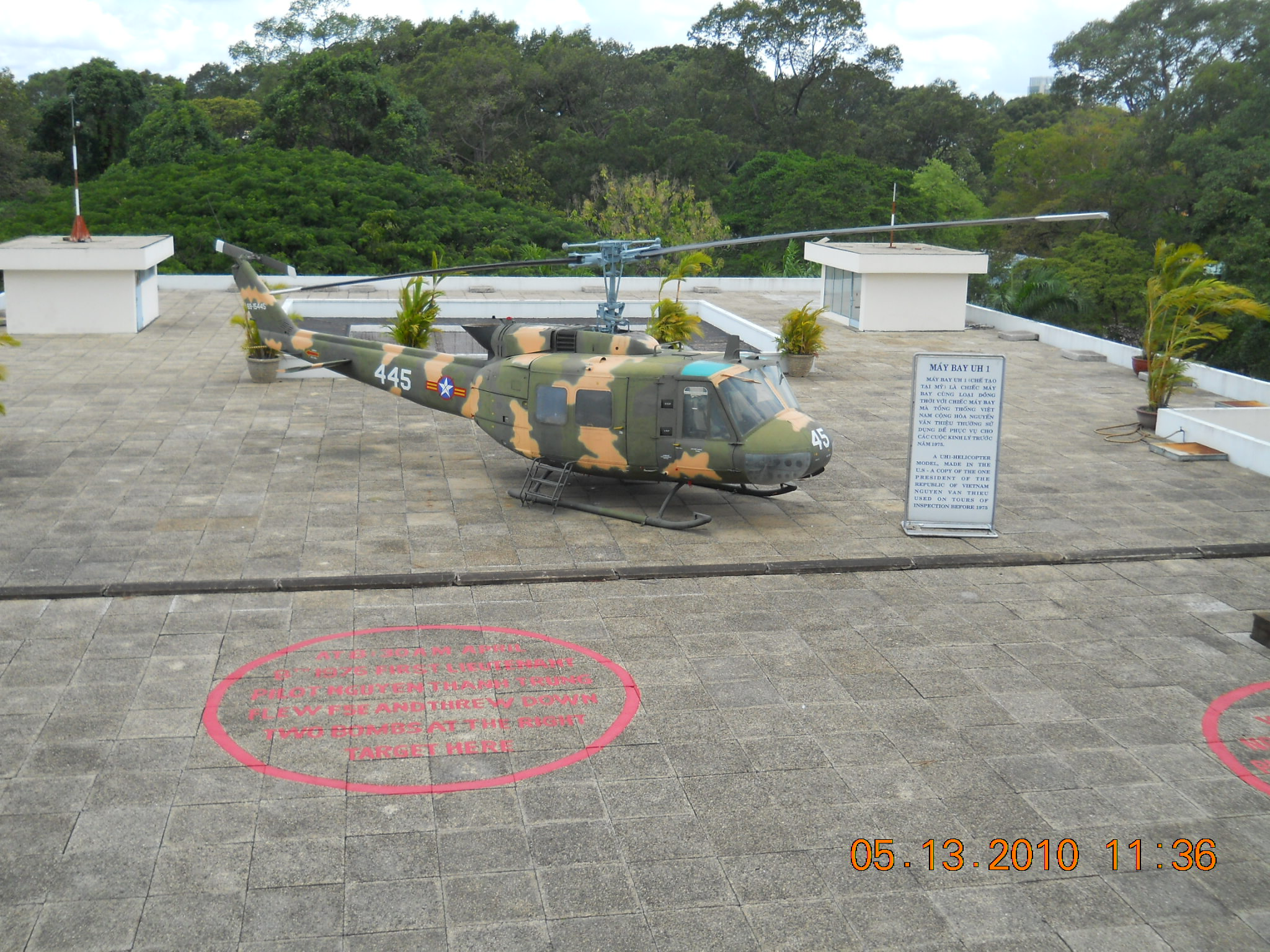 Tầng thượng dinh Độc lập. Dòng chữ tiếng Anh mang nghĩa: Tại nơi đây, Nguyễn Thành Trung đã lái chiếc máy bay địch bỏ bom xuống Dinh Độc lập vào ngày 10/4/1975